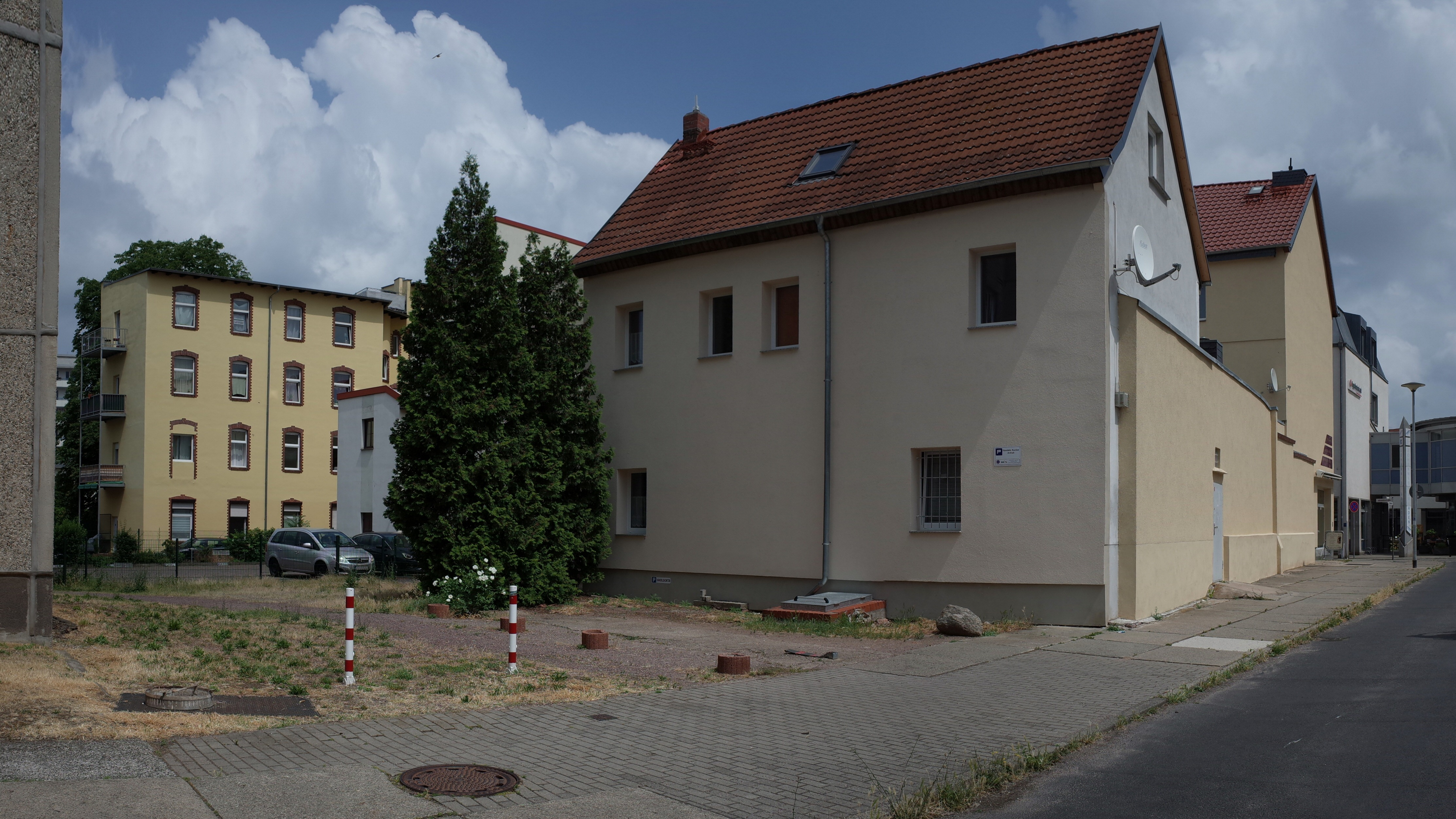 Dessau-Roßlau, Hausmannstraße, Ecke Johannisstraße. Zum Gedenken an die ermordete Studentin Li Yangjie wurde in der nähe der Tatwohnung ein weißer Rosenstrauch gepflanzt. (Quelle: Mitteldeutsche Zeitung [1])